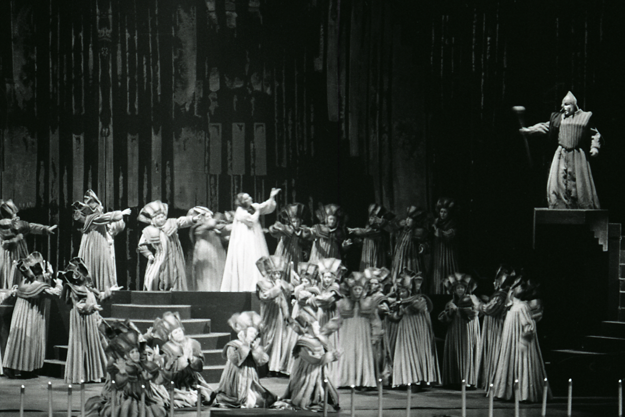 Servizio fotografico : Italia, 1973 / Paolo Monti. - Strisce: 7, Fotogrammi complessivi: 35 : Negativo b/n, gelatina bromuro d'argento/ pellicola ; 35 mm. - ((Sul portanegativi: N[I]K[MA]T Tri-x. - L'ultimo fotogramma della serie (il n. 37) non è numerato. - Fonte: Agenda di Paolo Monti: Leica 1501-3000 Controllo numerazione (1950-1978), presso Archivio Paolo Monti